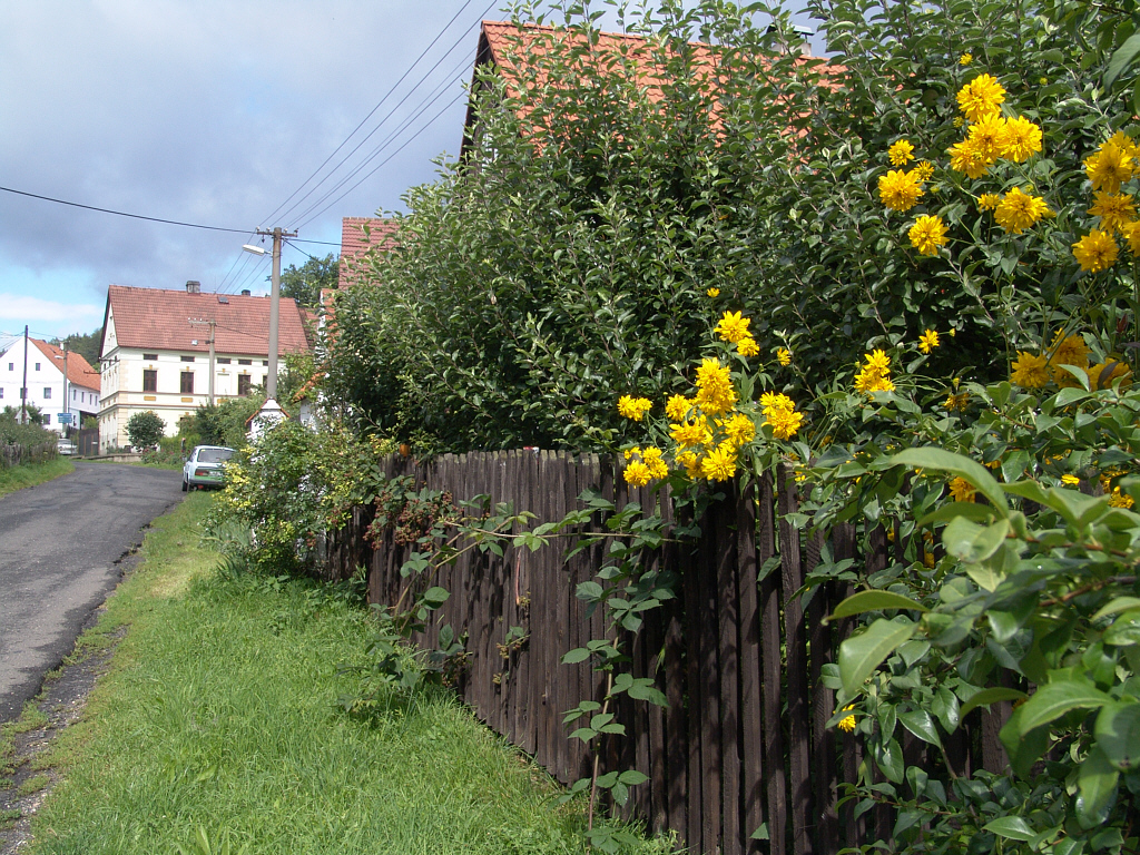 Das Straßendorf Ritschen im Böhmischen Mittelgebirge (Foto von 2005).